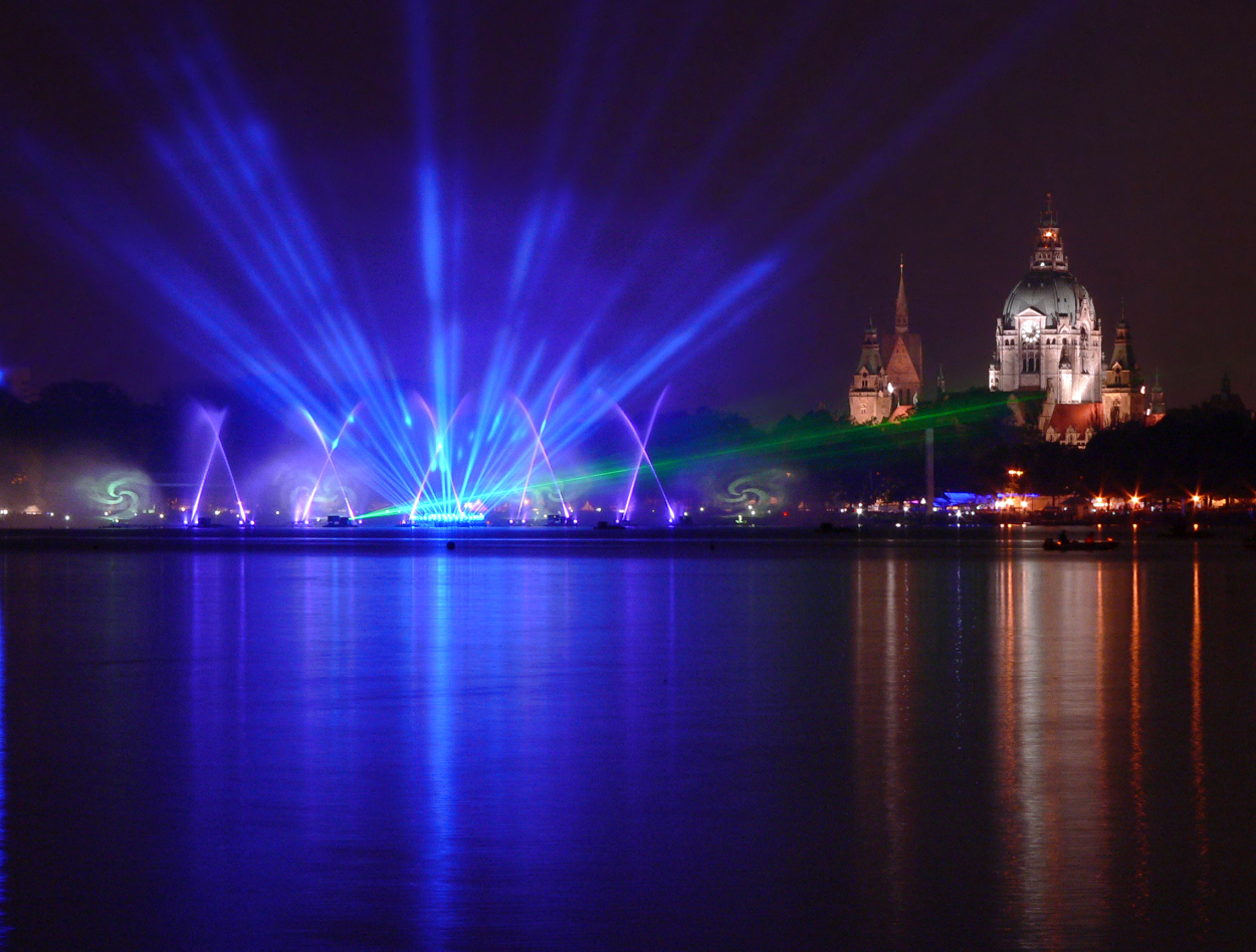 2014 Tag der Deutschen Einheit (Hannover)